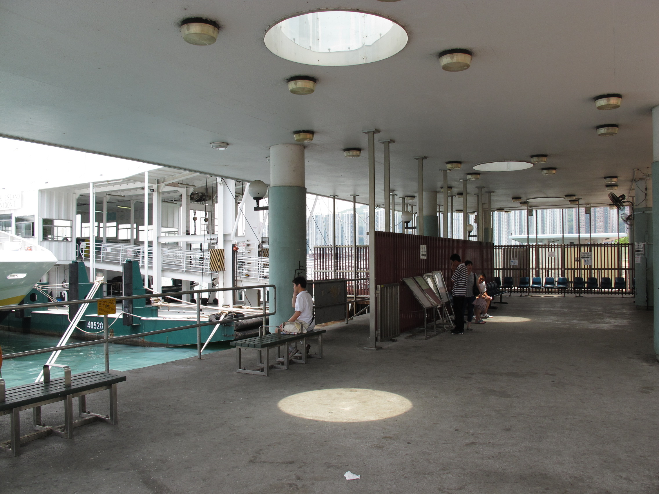 Tsuen Wan Pier View 荃灣碼頭內部